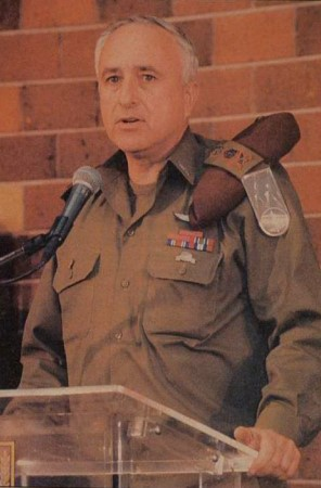 תדרוך של הרמכ"ל אמנון ליפקין-שחק